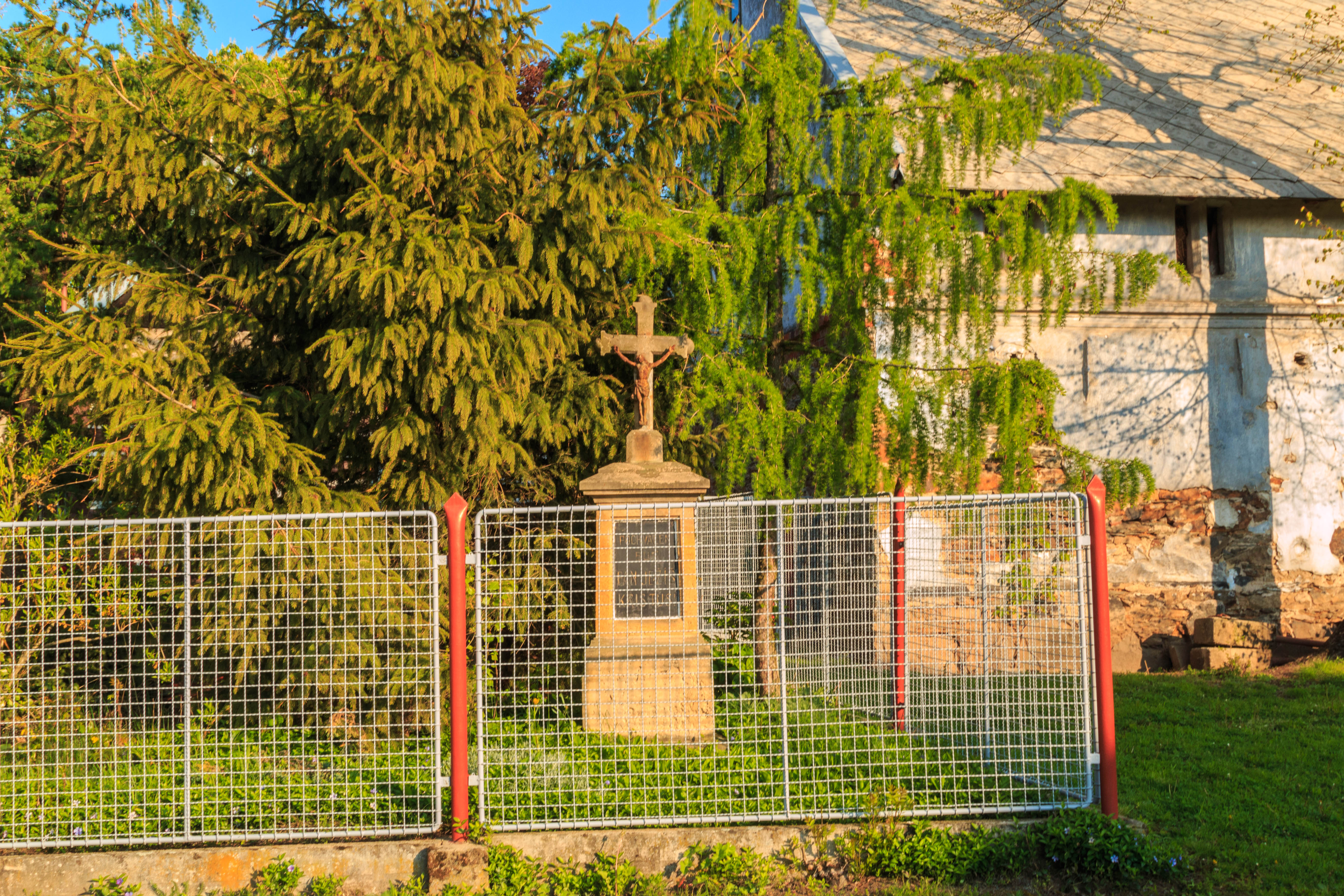 Oldřiš křížek